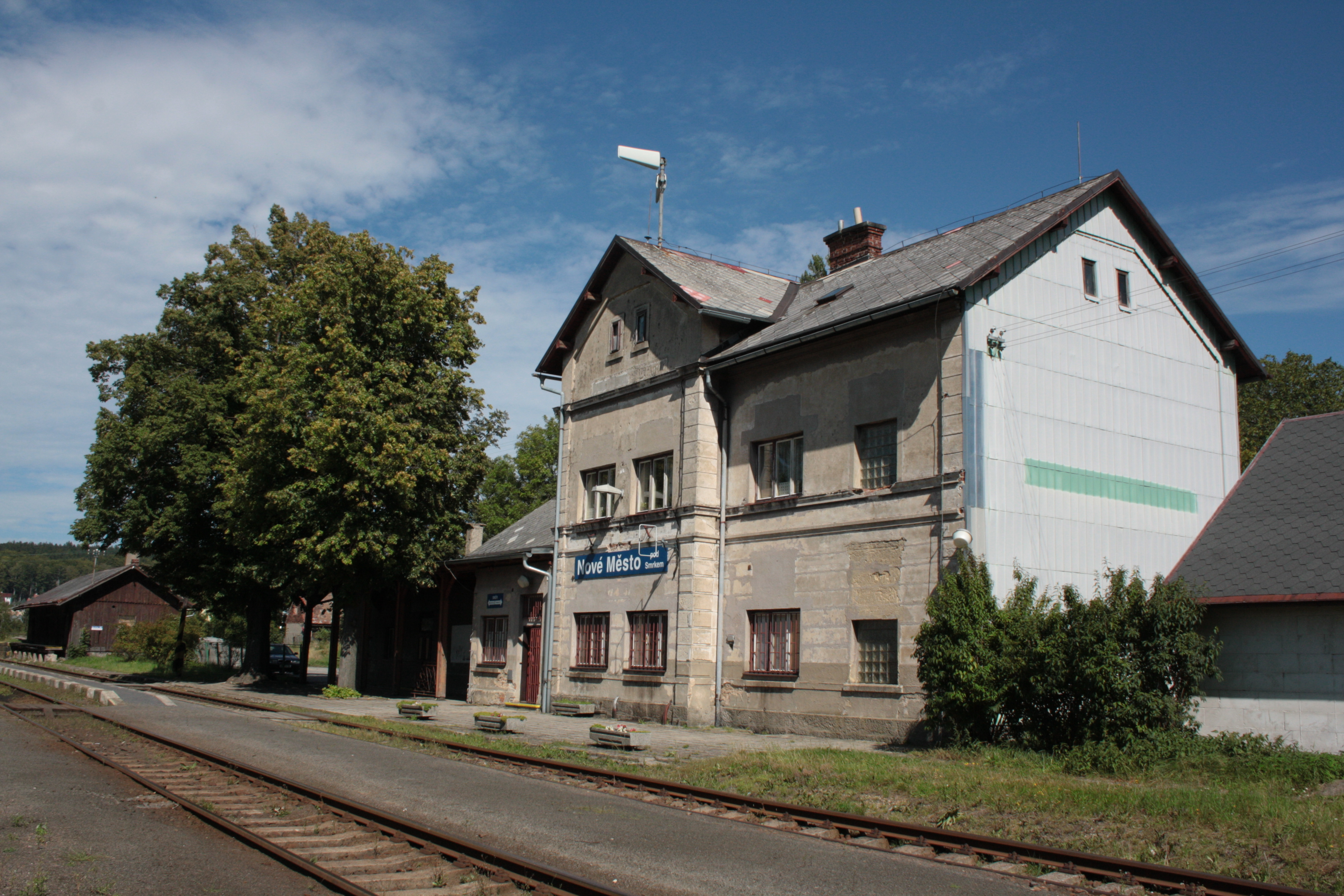 Staniční budova na železniční zastávky v Novém Městě pod Smrkem (pohled od jihozápadu).